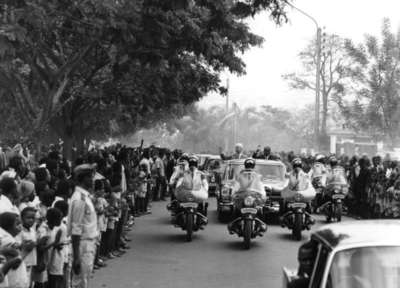 10.2.1969 Staatsbesuch Bundespräsident Dr. Heinrich Lübke in Niger